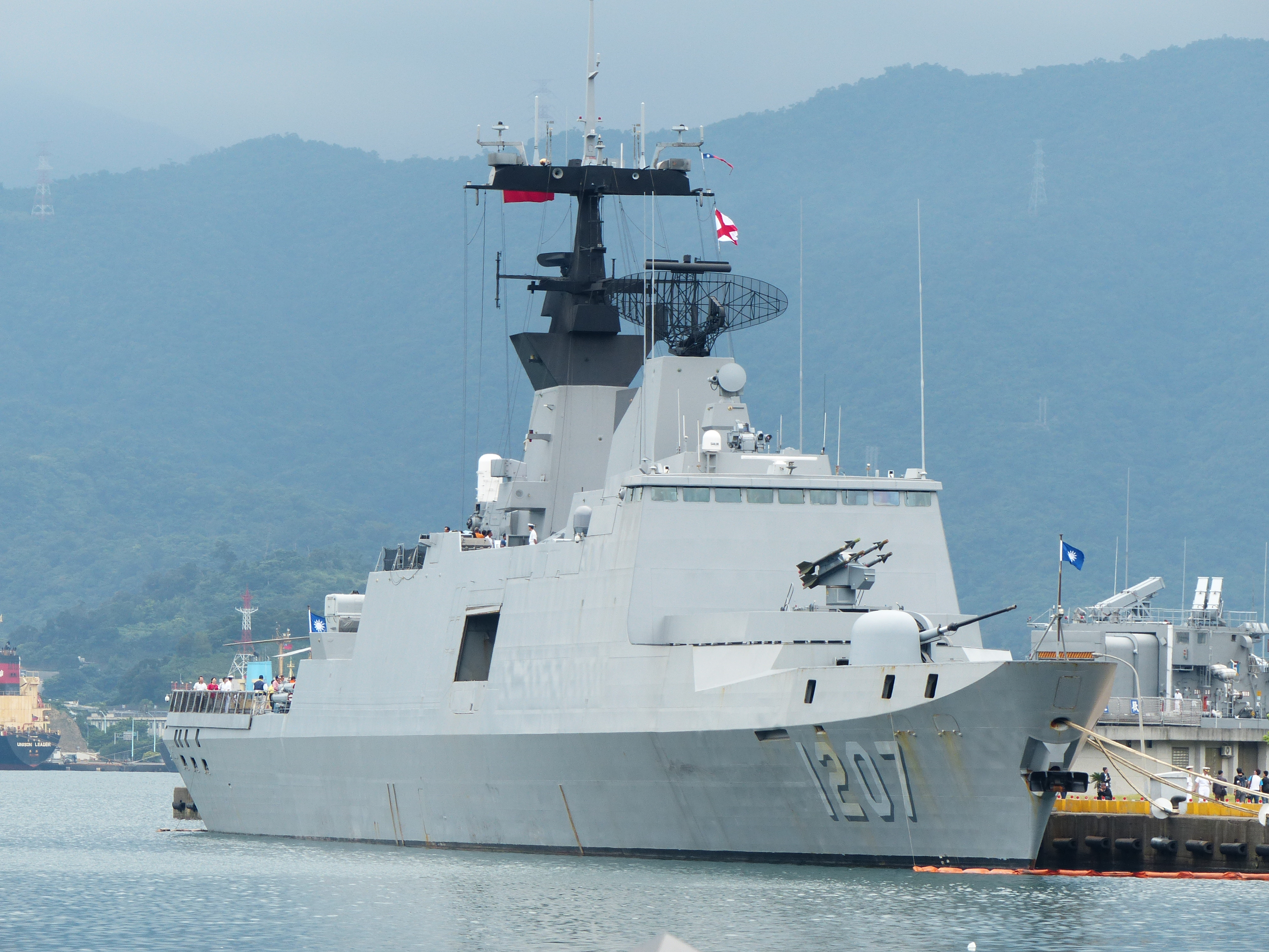 中文（台灣）: 2013年中正軍港營區開放活動，從5號碼頭東北望停泊9號碼頭的巡防艦武昌（FFG-1207）。